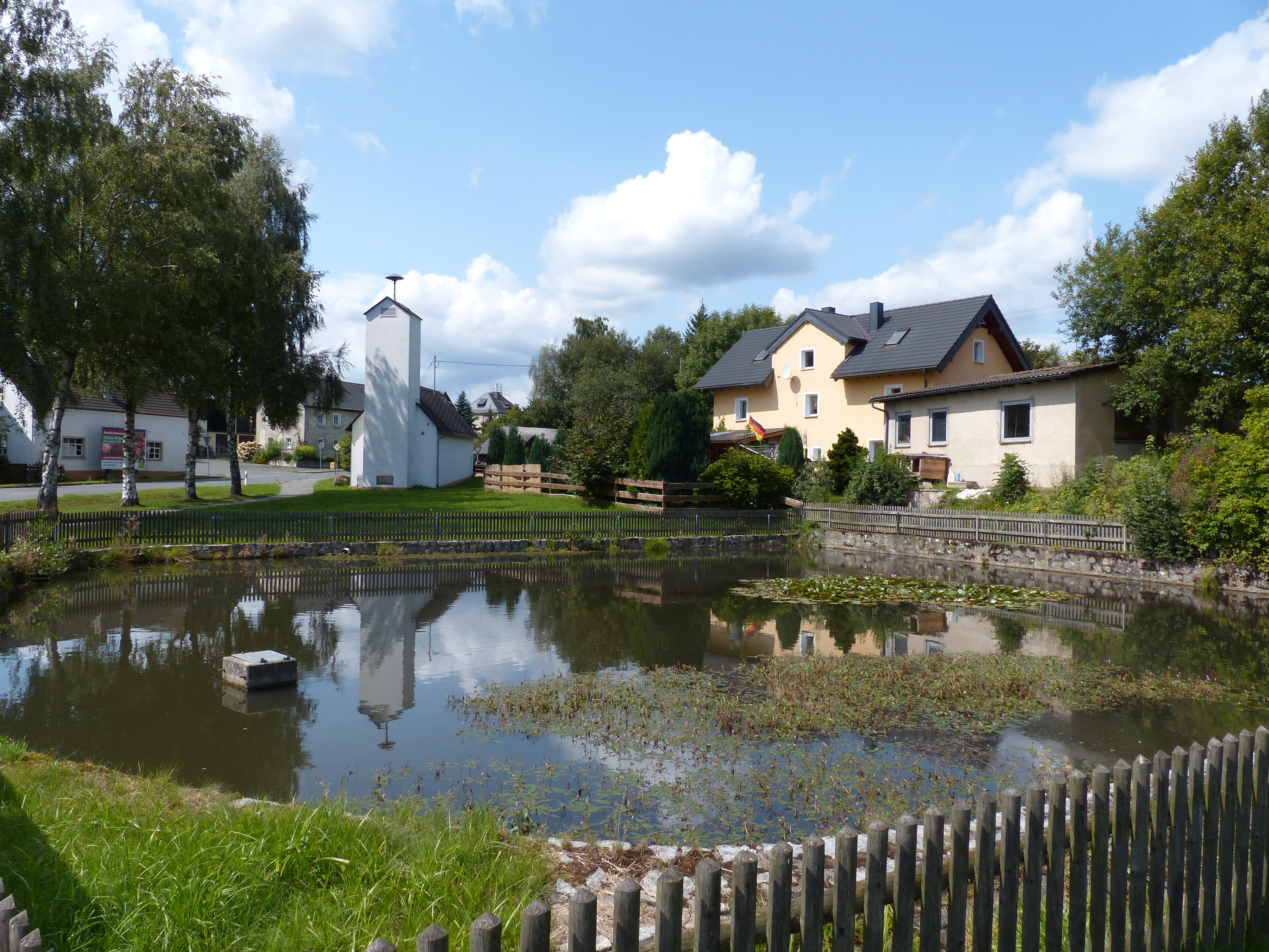 Ansicht aus dem Gemeindegebiet Konradsreuth, Landkreis Hof